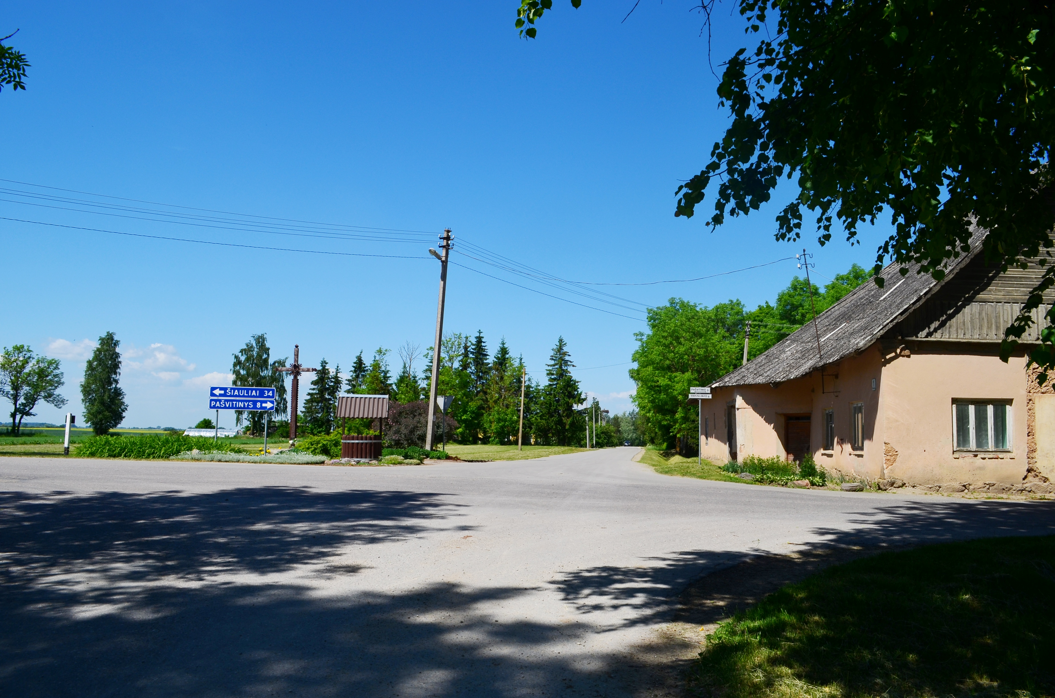 Mikniūnai, Pakruojo raj.